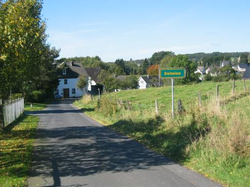 Ortsansicht von Breitewiese (Gemeinde Nümbrecht) Kamera: Canon Power Shot S45